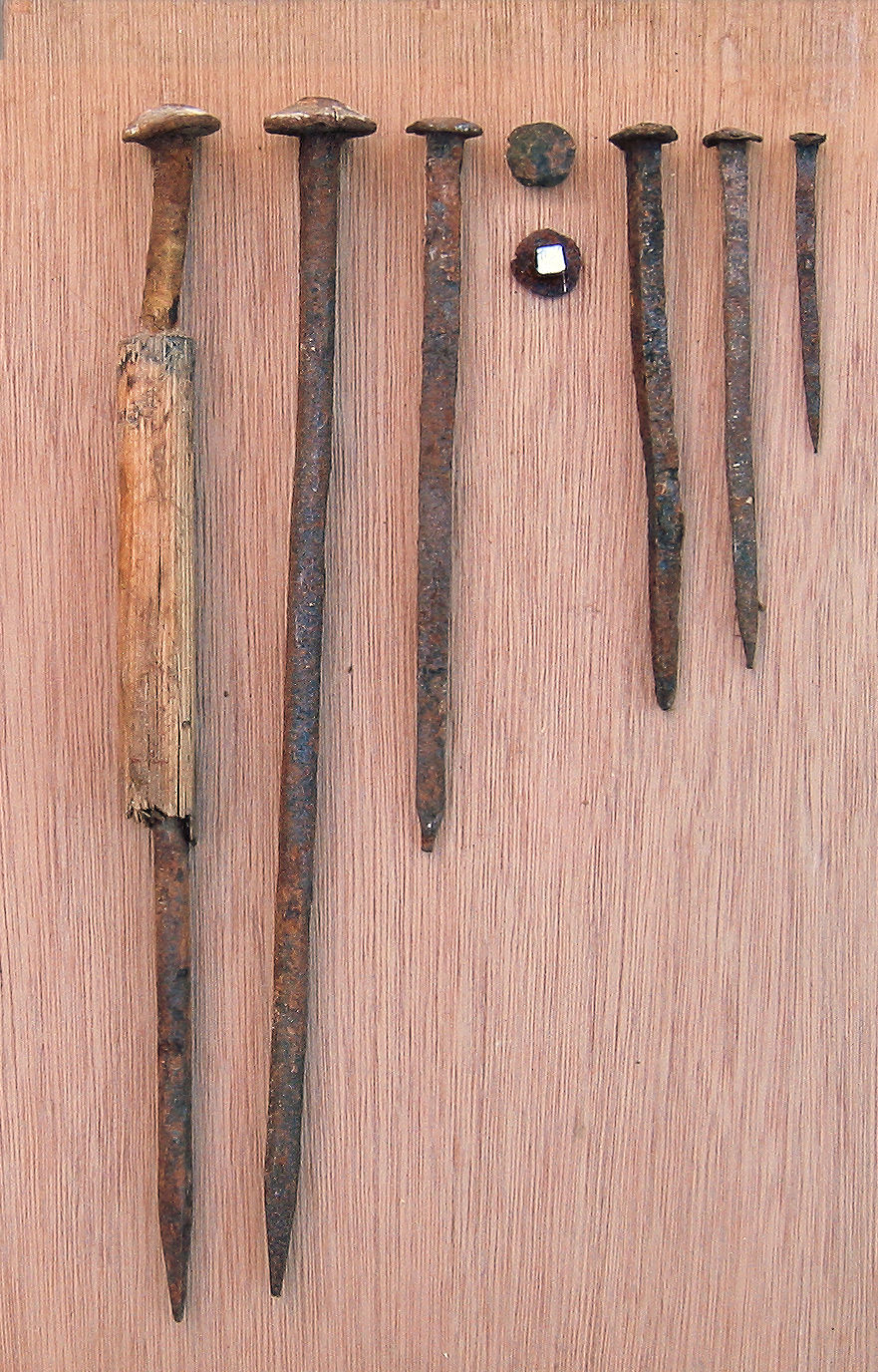 Spijkers van de Concordia molen te Ede